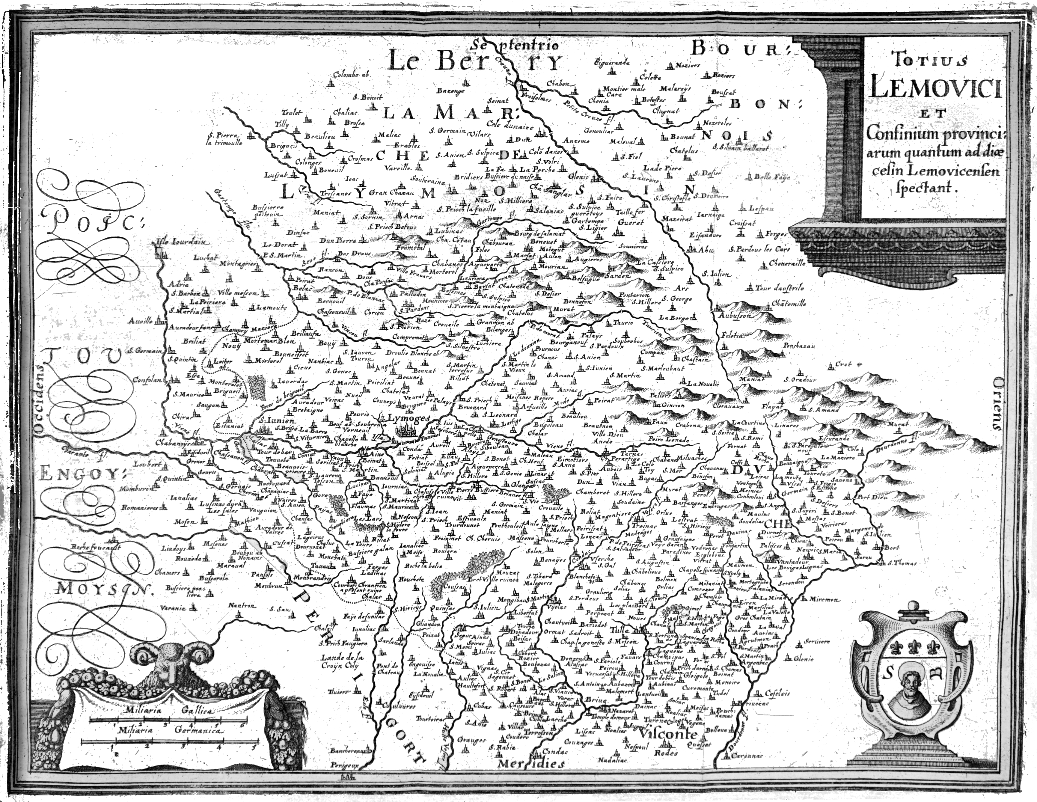 provenant de "Topographiae Galliae".